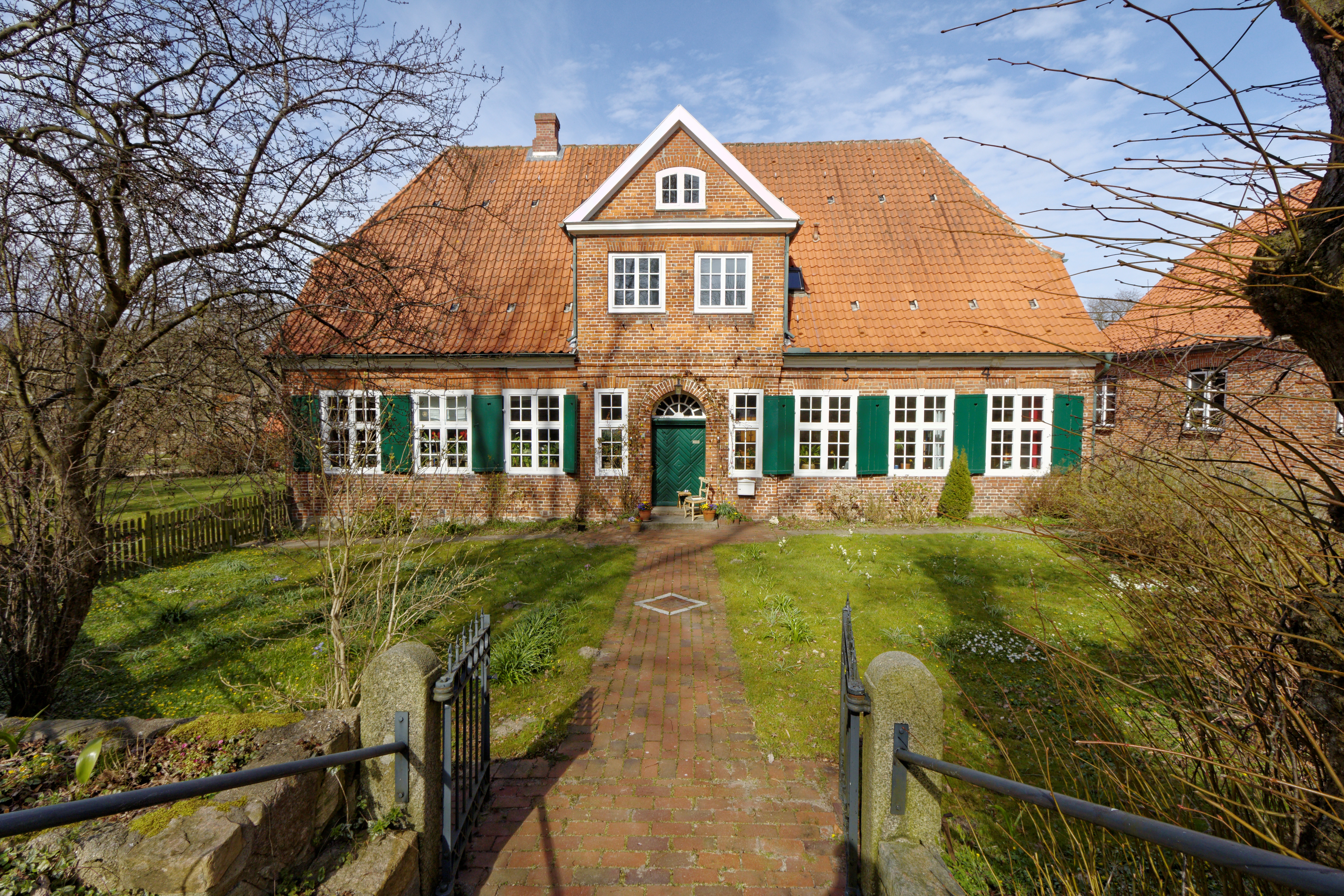 Westensee, Dorfstr. 1; Pastorat